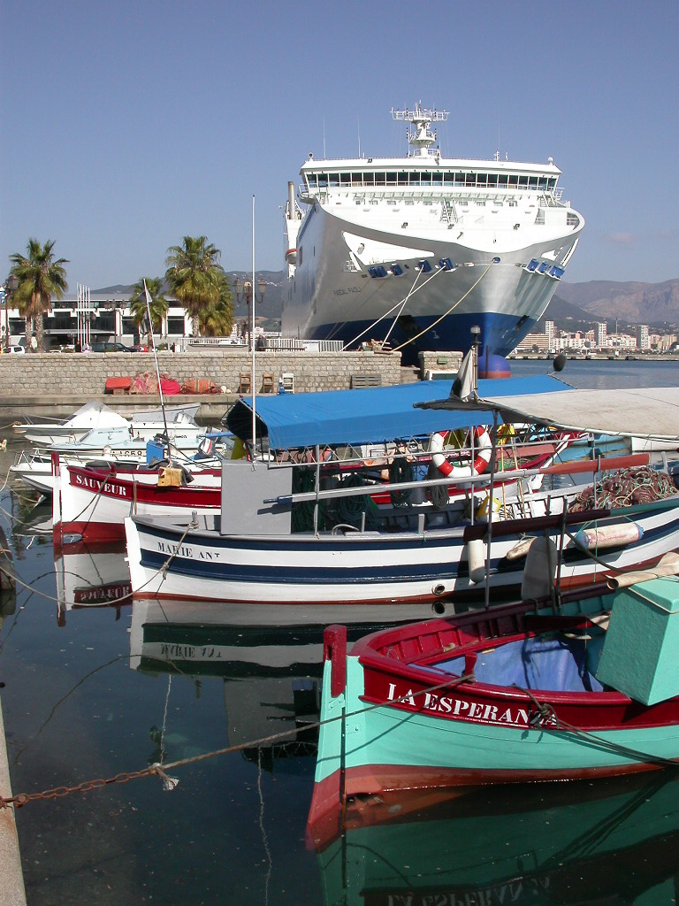 Ferry au Port D'ajaccio